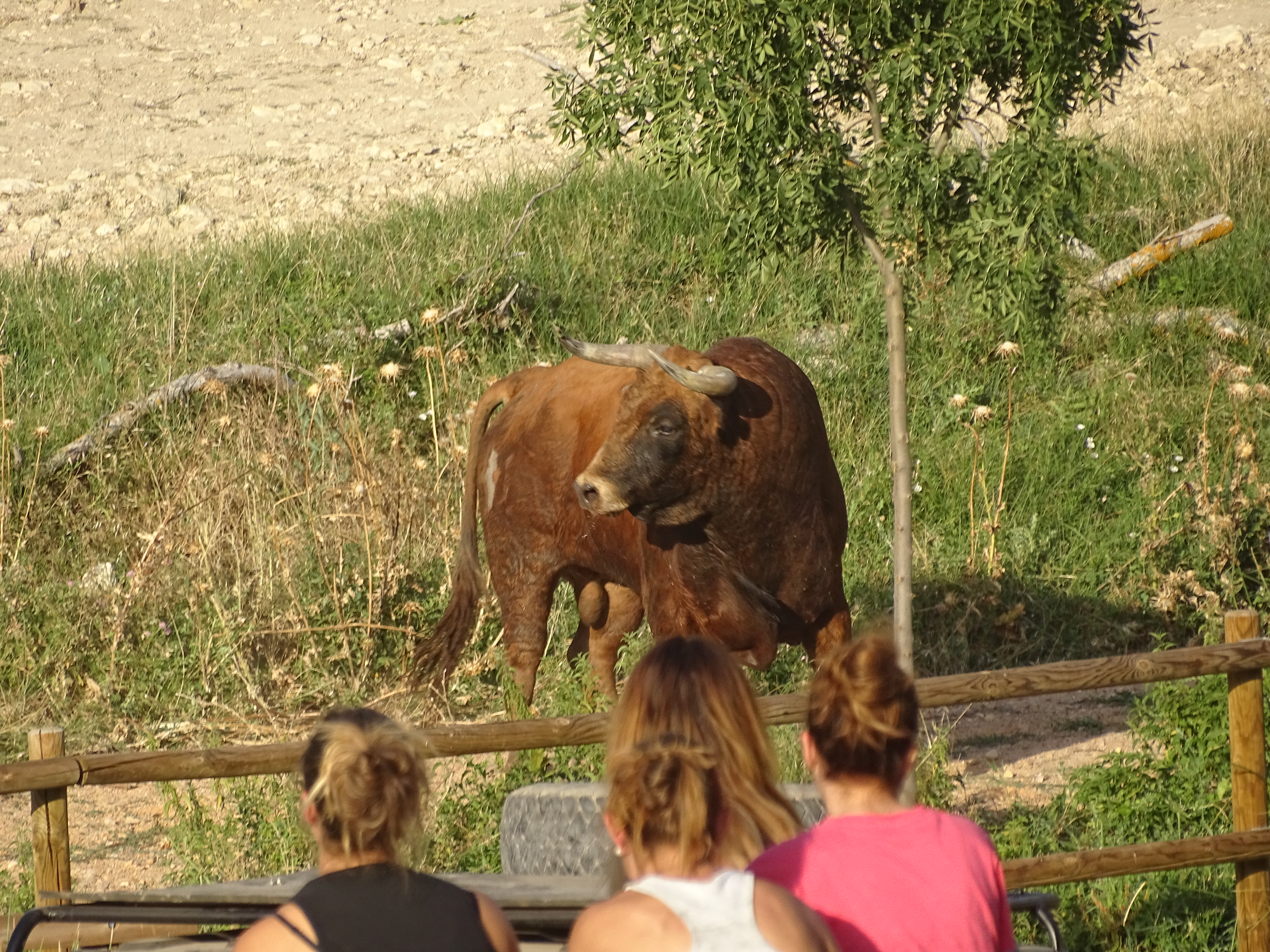 Encierro 2017-07-29